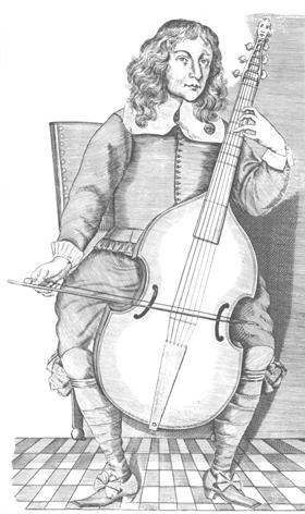 Portrait de Christopher Simpson.